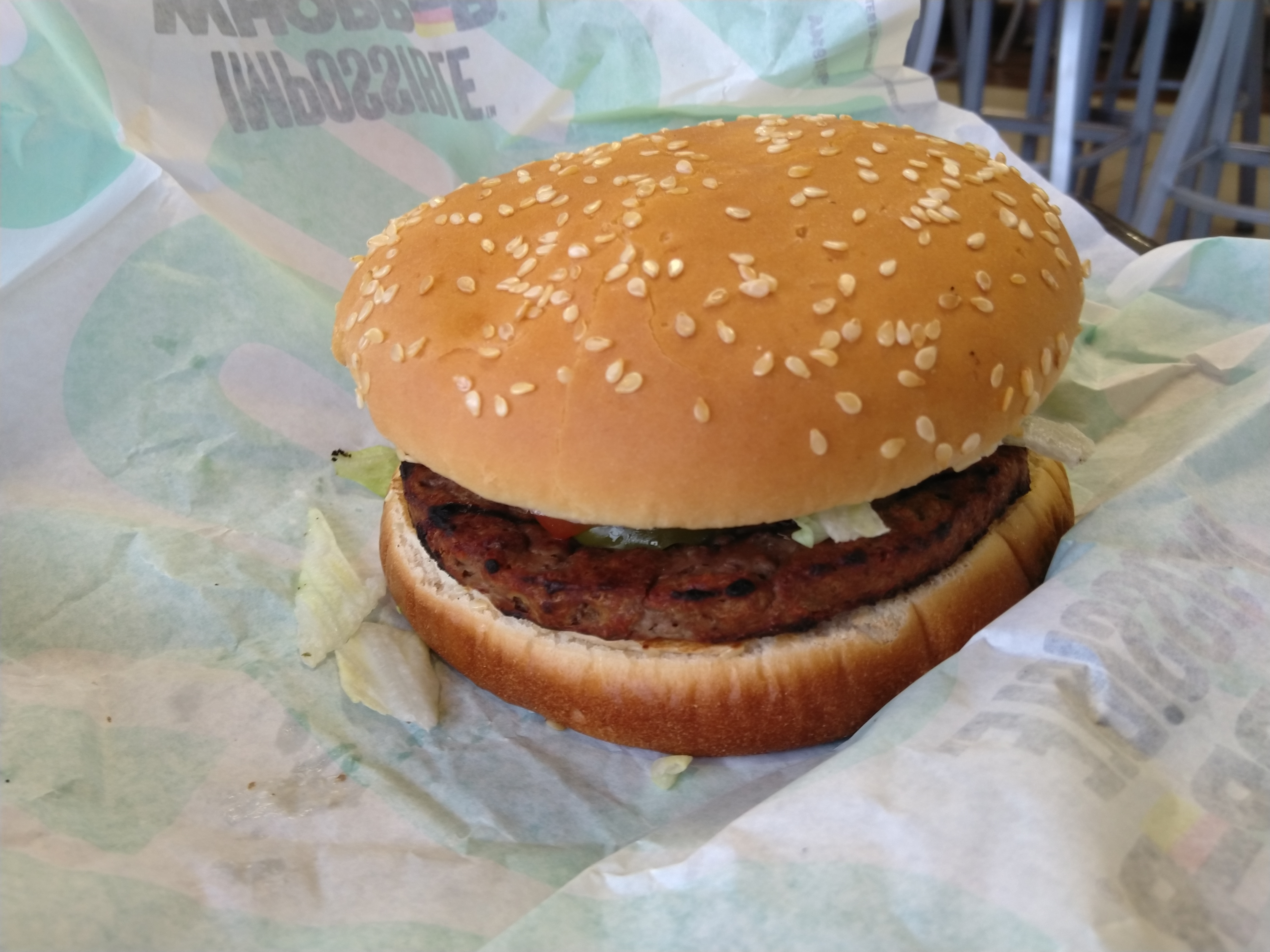 Vom Burger King einen Impossible Whoppers vom die Firma Impossible Foods aus Redwood City, Kalifornien, USA Impossible Foods ist ein Unternehmen, das pflanzliche Fleisch- und Milch-Substitute ohne Tierbestandteile entwickelt